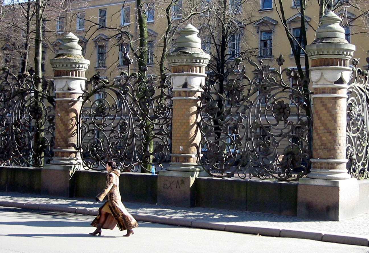 ironwork